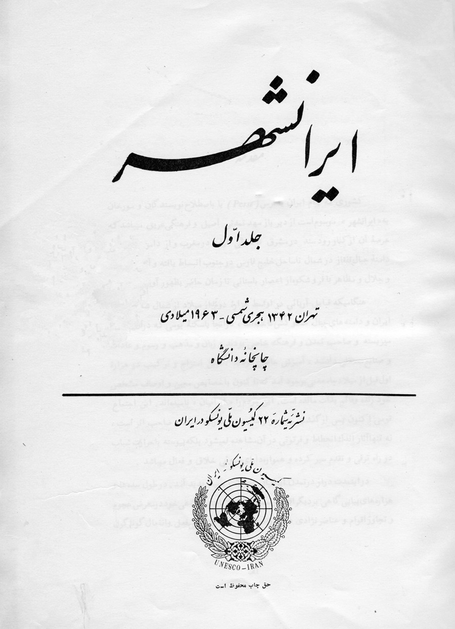 صفحه اول کتاب ایرانشهر که به سال 1969 میلادی و 1342 شمسی به چاپ رسیده است